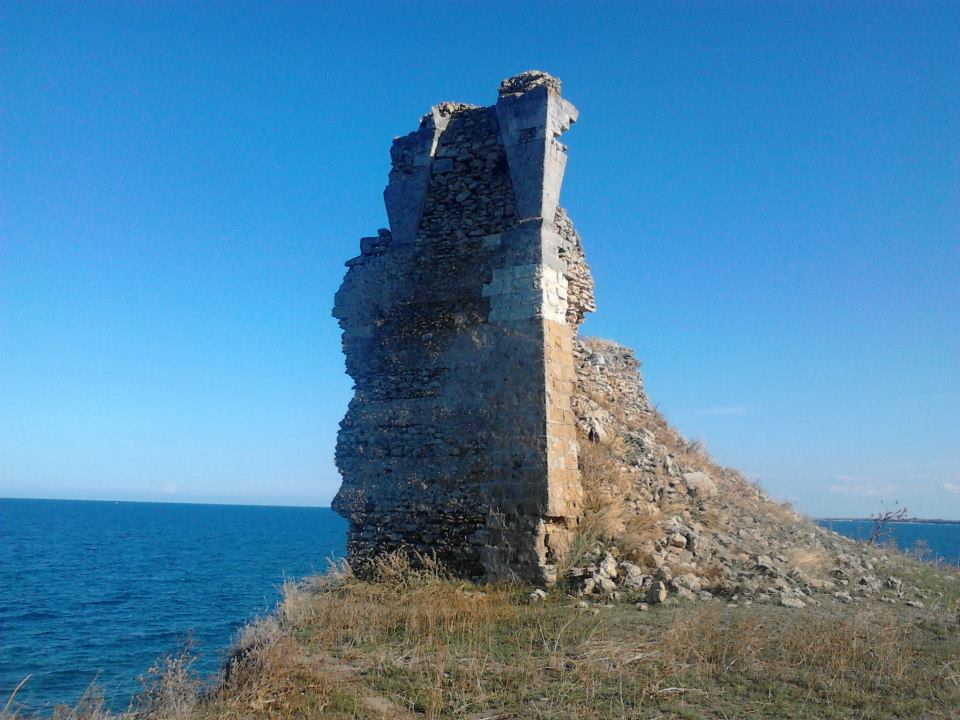 Foto Torre Mattarelle